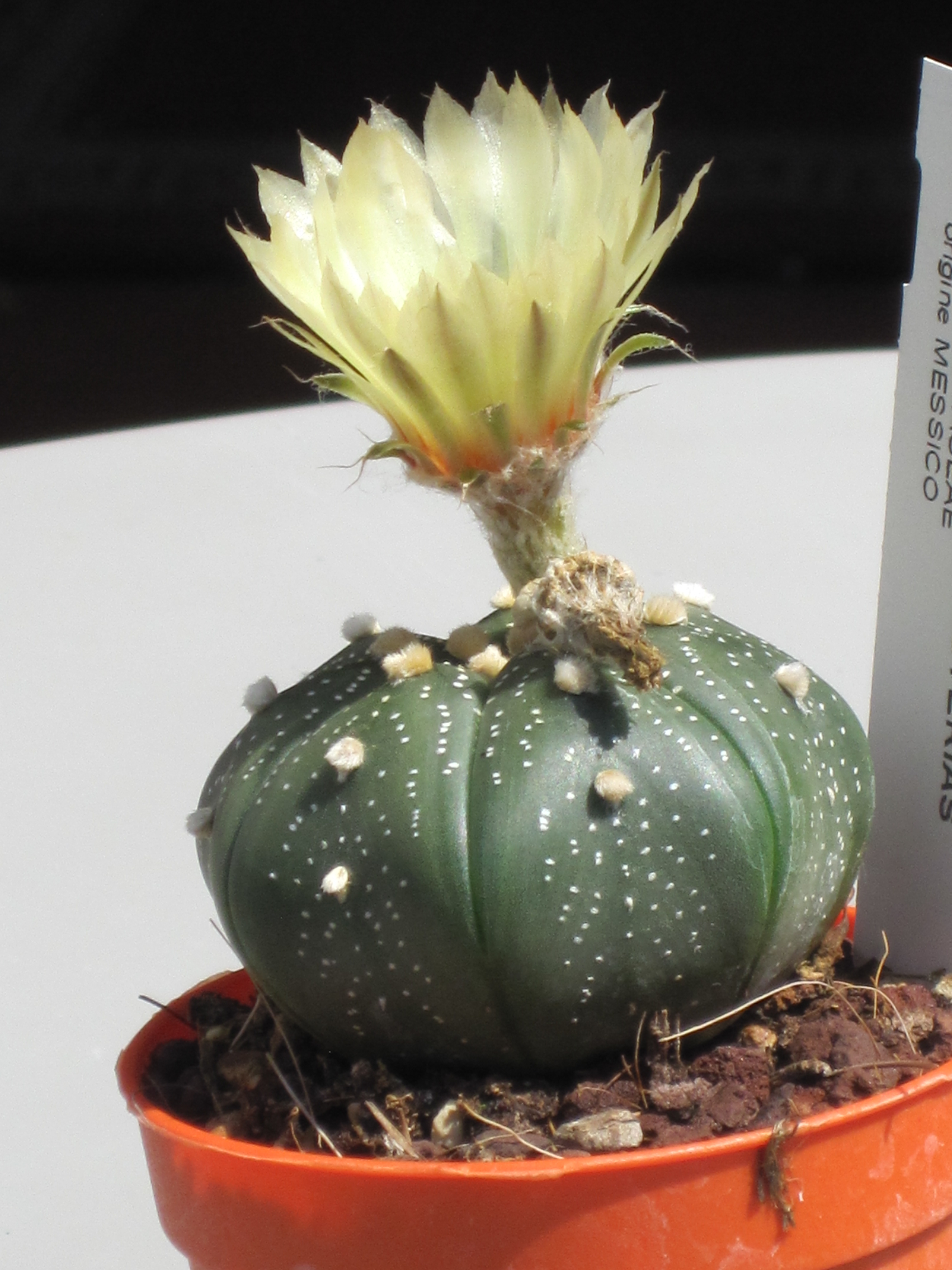 Astrophytum asterias in fioritura